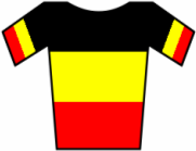 Maillot de Bélgica